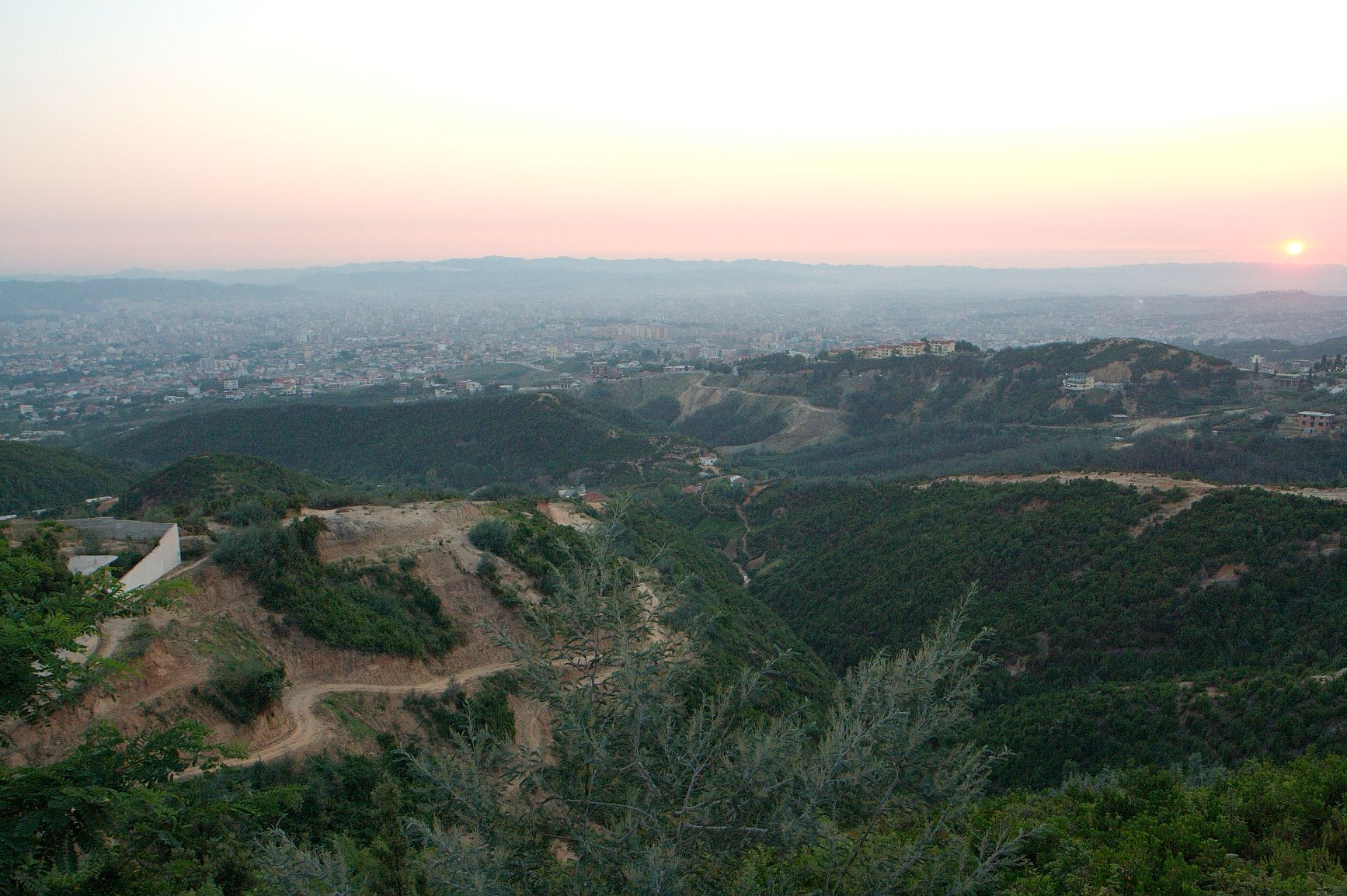 Taken in Tirana, Albania